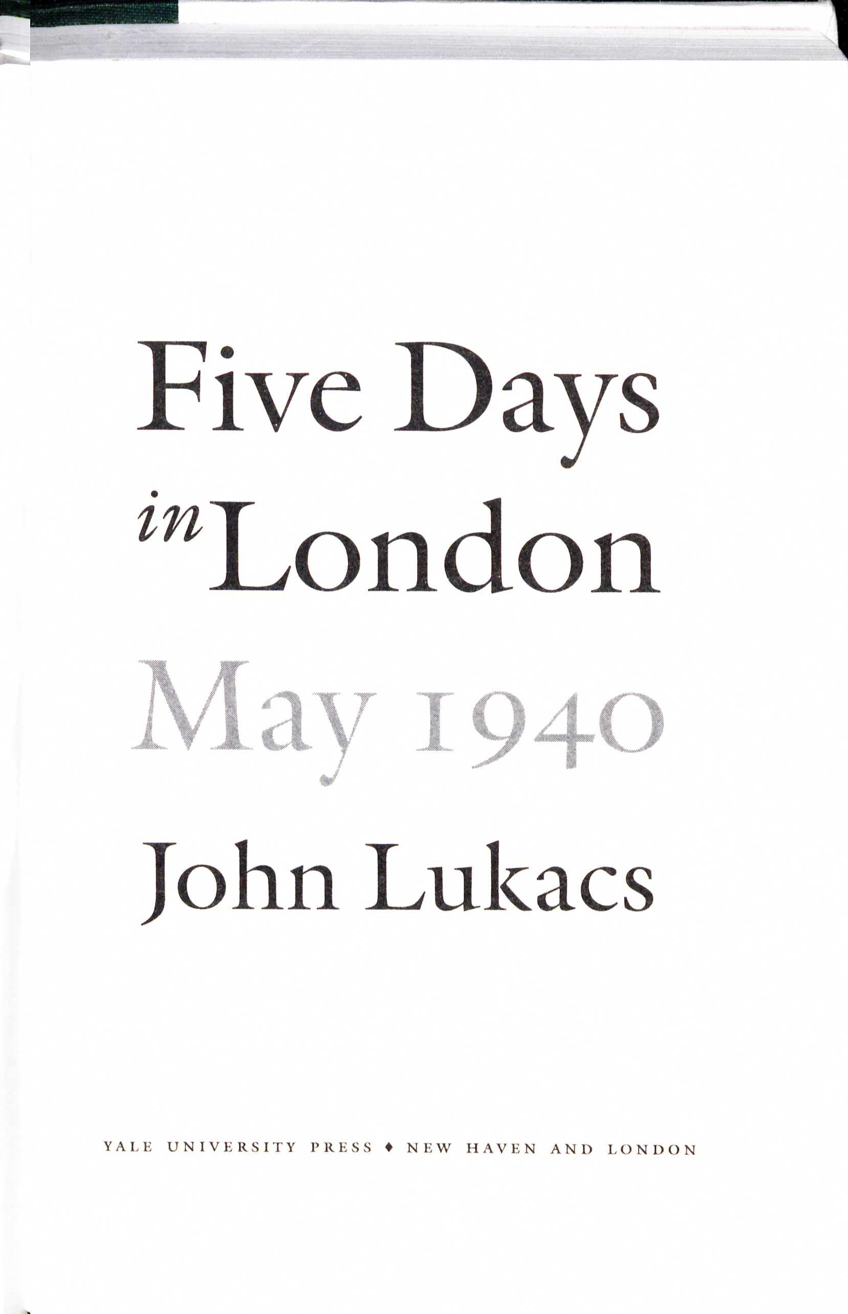 John Lukacs Five Days in London, May 1940 Title